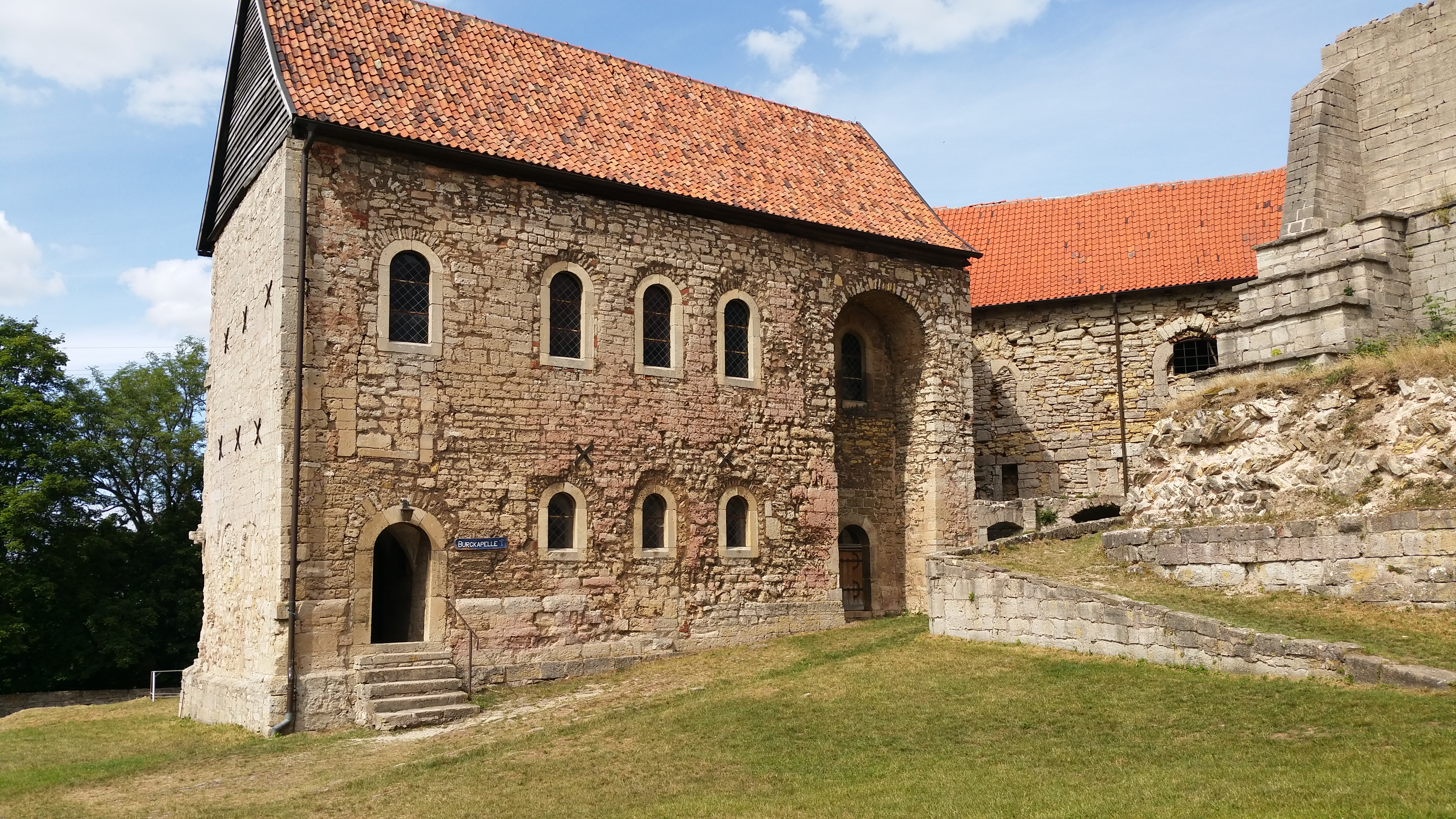 Burg Lohra